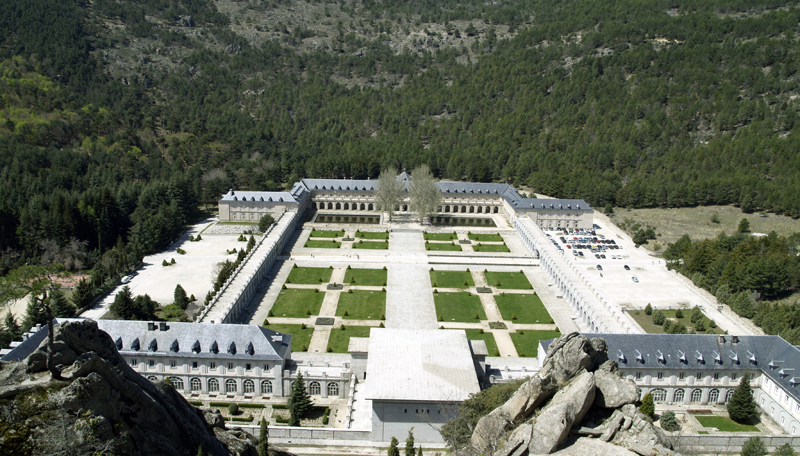 Abadía del Valle de los Caídos / Valley of the fallen Abbey (Madrid, Spain)